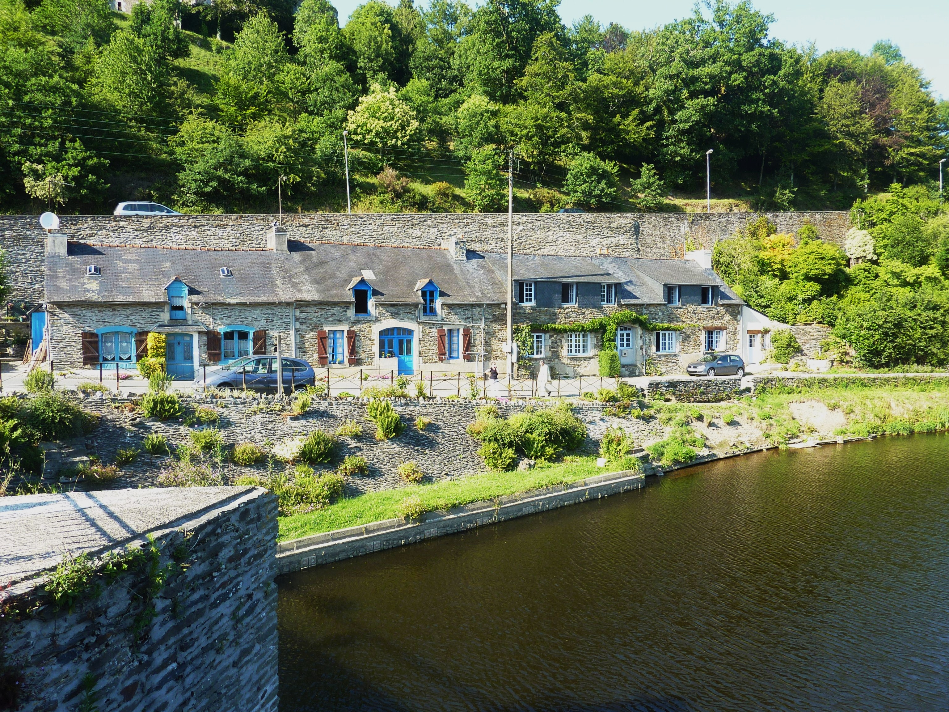 Châteauneuf-du-Faou : le port sur l'Aulne (canal de Nantes à Brest) , anciennes maisons de mariniers